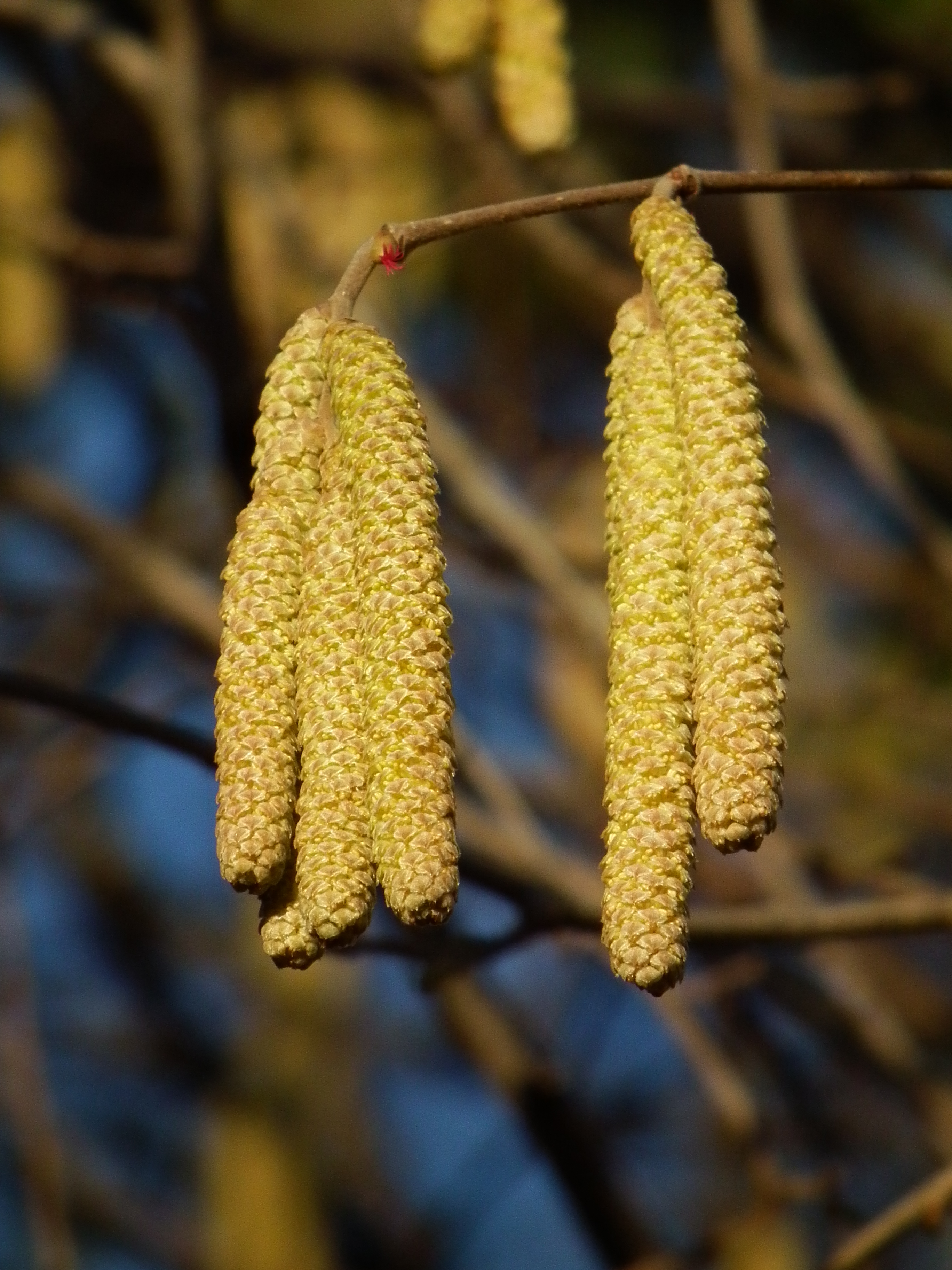 Blütenkätzchen der Gemeinen Hasel (Corylus avellana), fotografiert in Heidelberg (Baden-Württemberg, Deutschland)